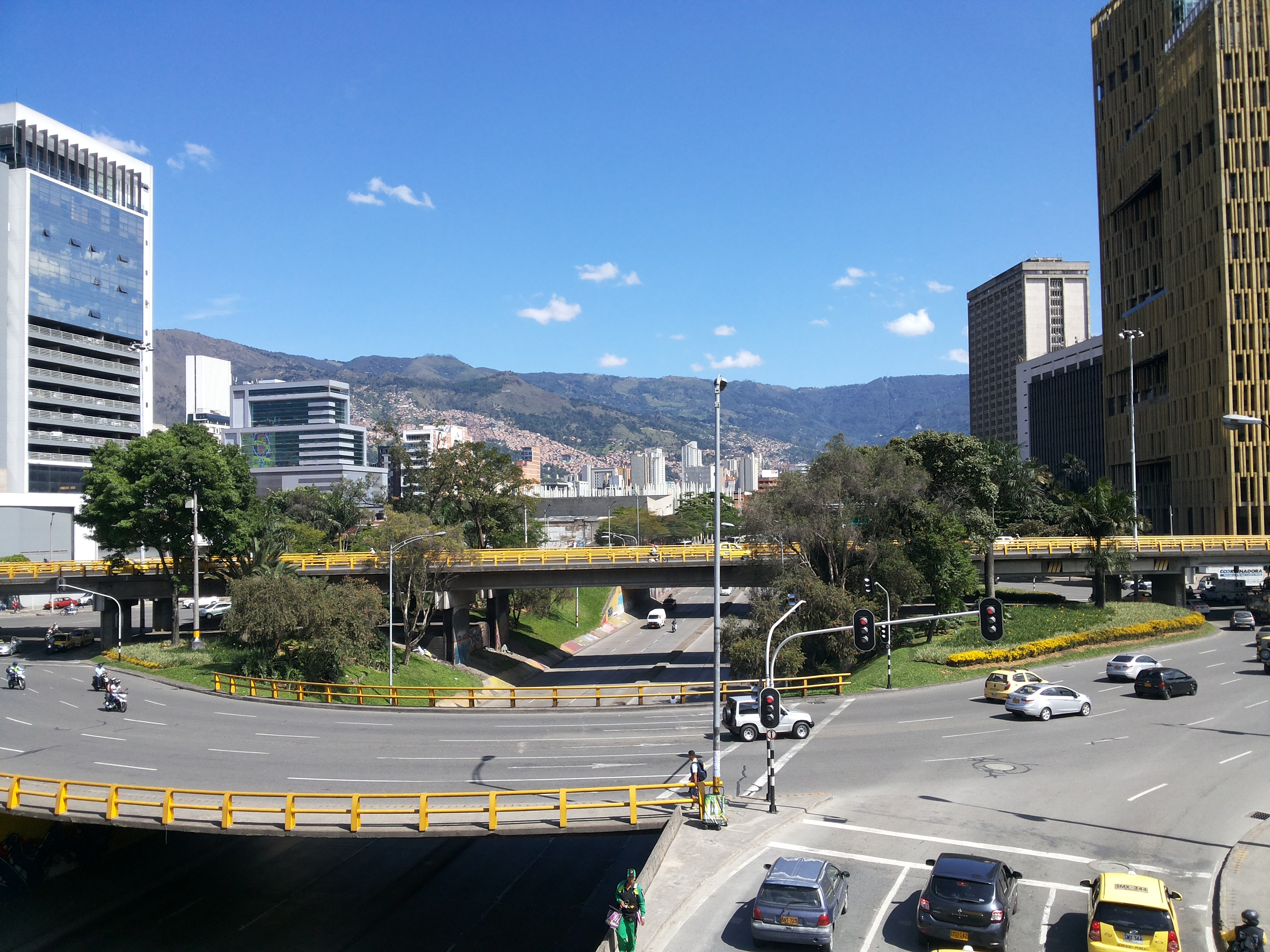 Intercambio vial San Juan con Avenida del Ferrocarril, Medellín, Colombia.